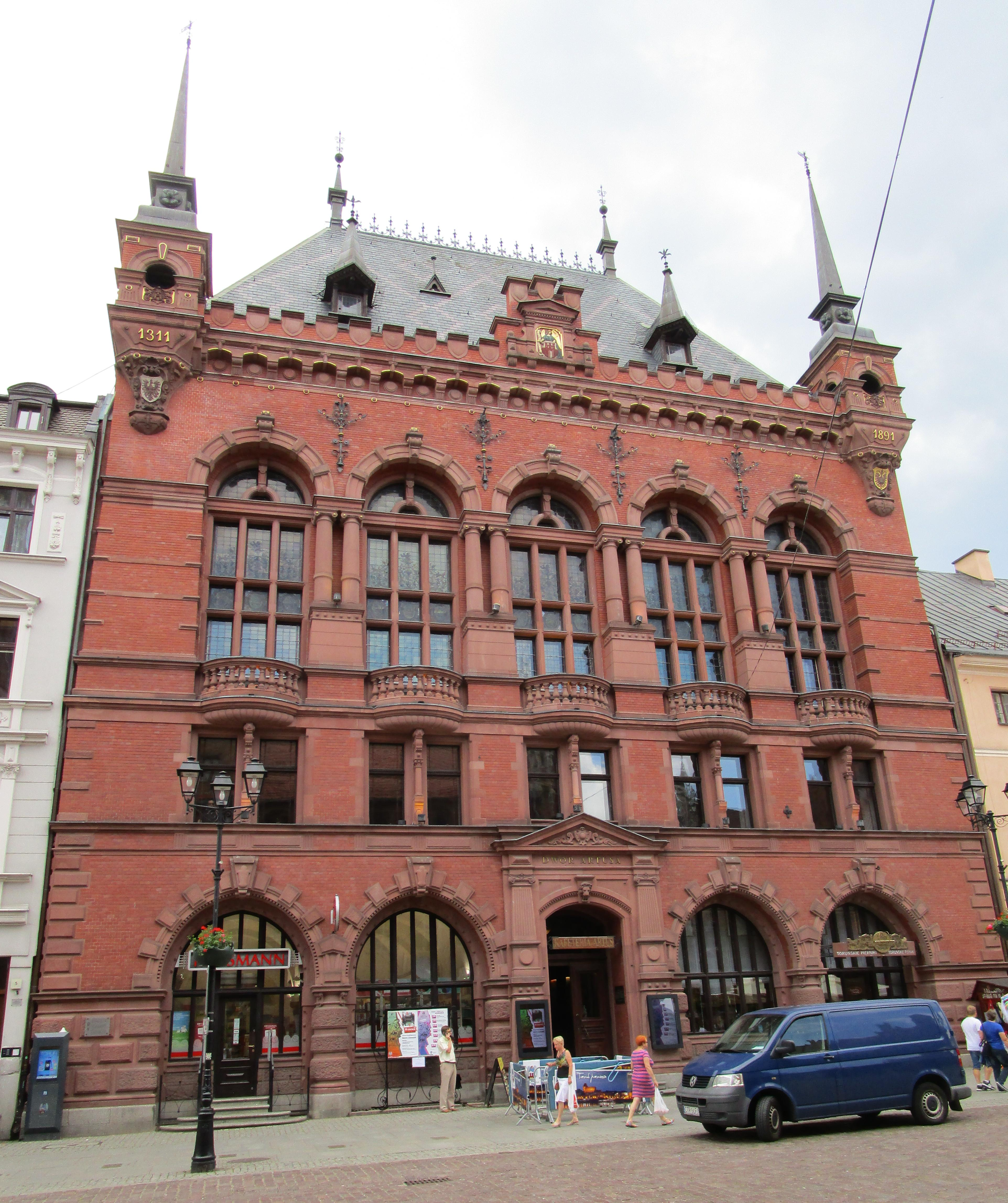 Der Artushof in Torun